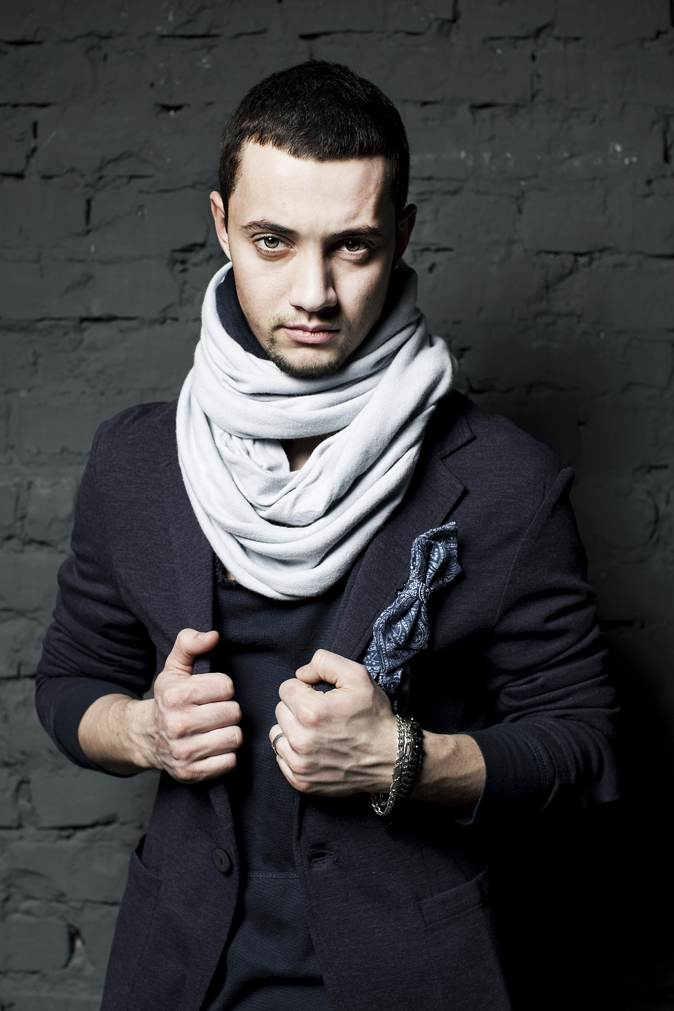 Стас Шуринс